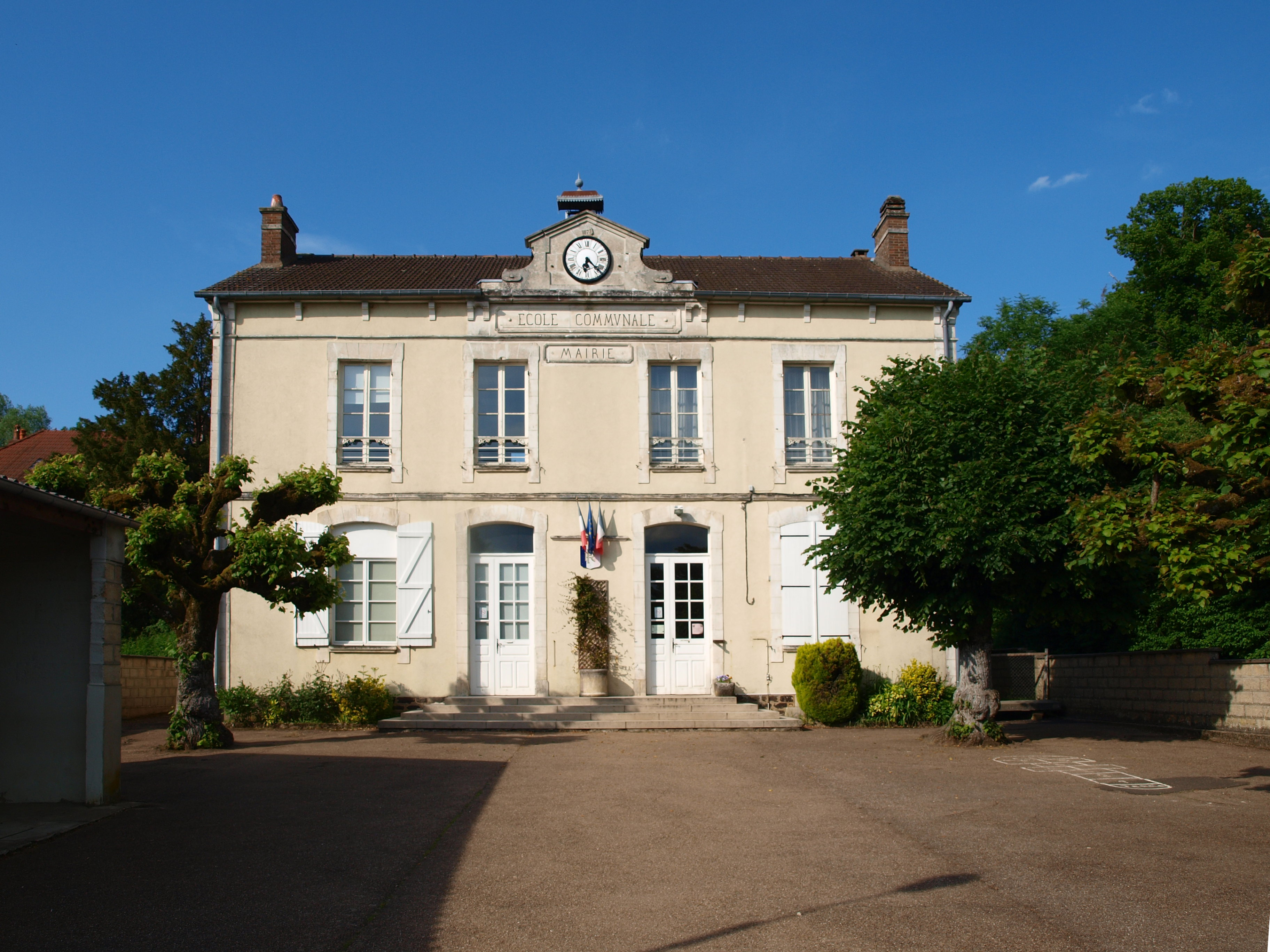 Leugny (Yonne, France) ; mairie